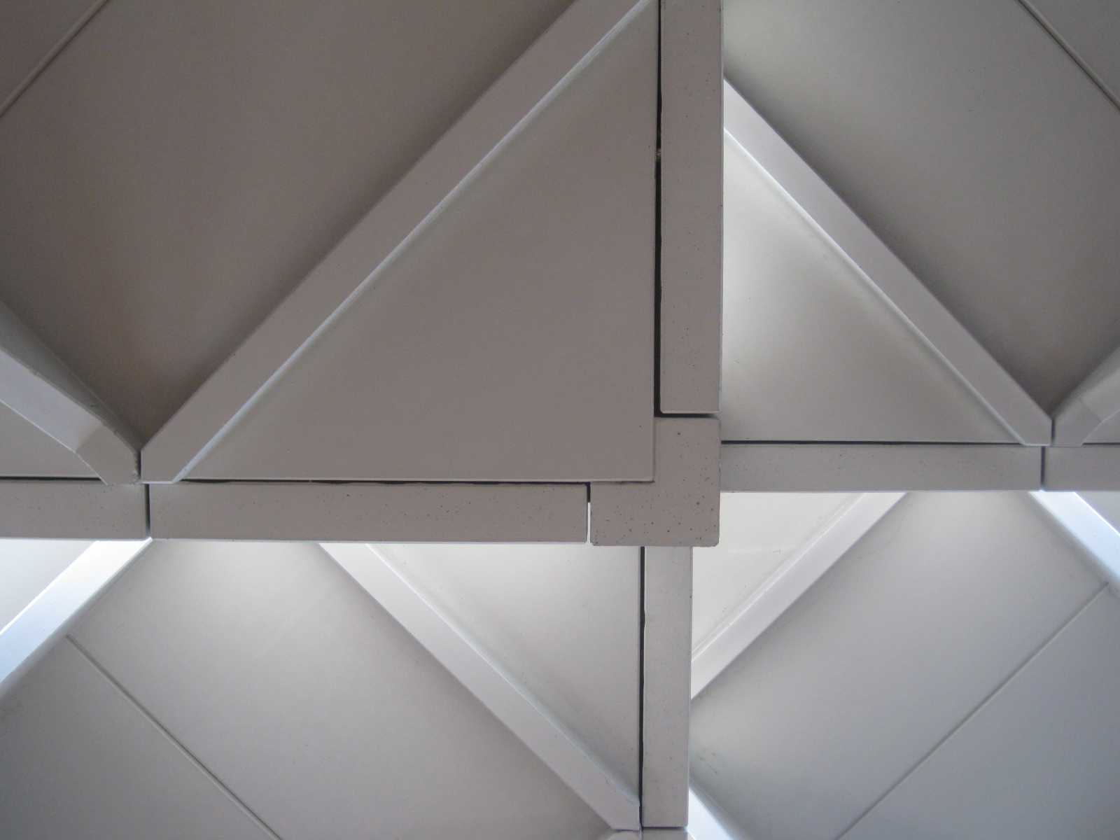 Kath. Kirche und Gemeindezentrum in Emsdetten (Architekt Dieter Georg Baumewerd, 1969)